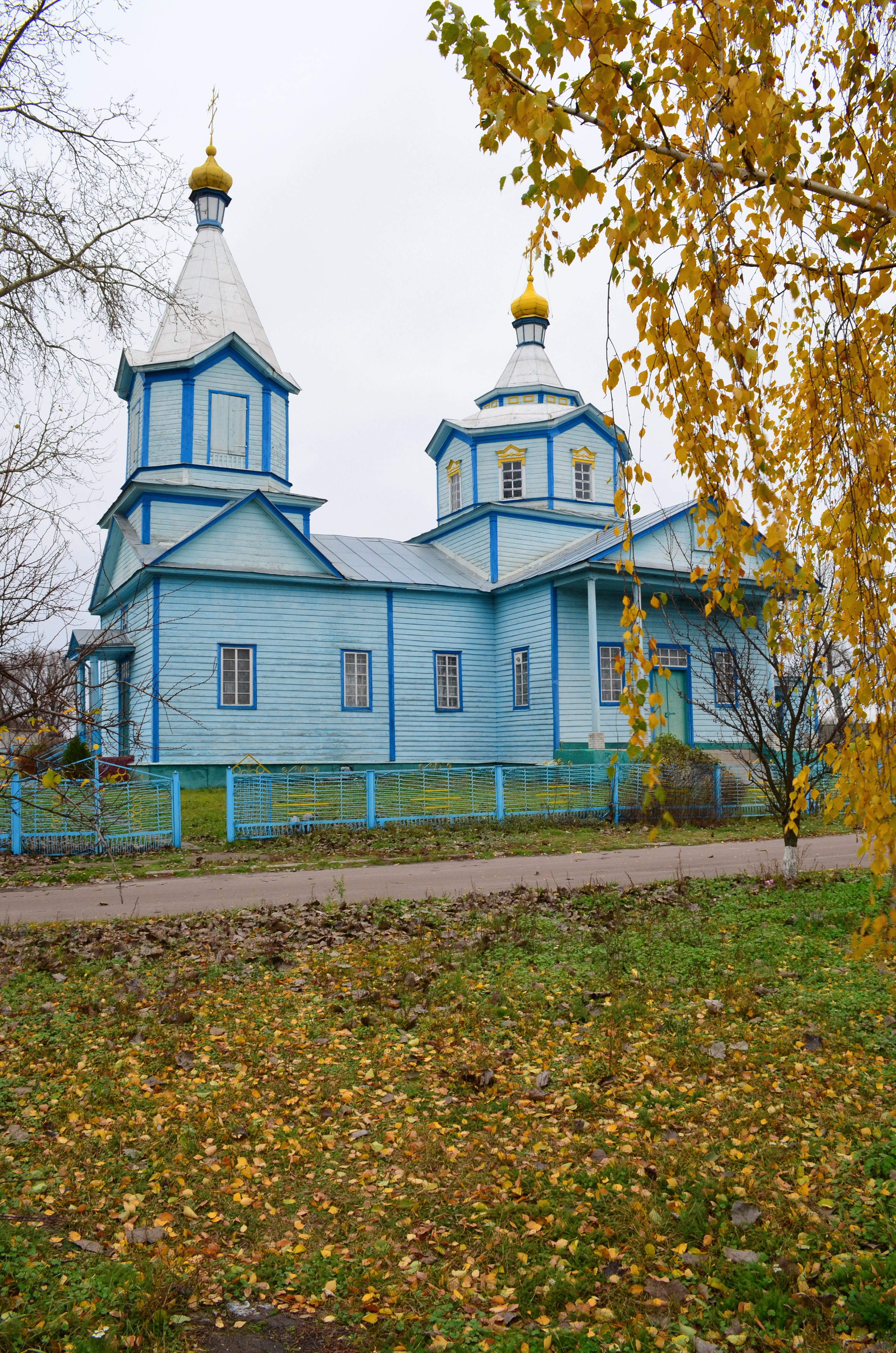 Миколаївська церква (дер.), село Бзів